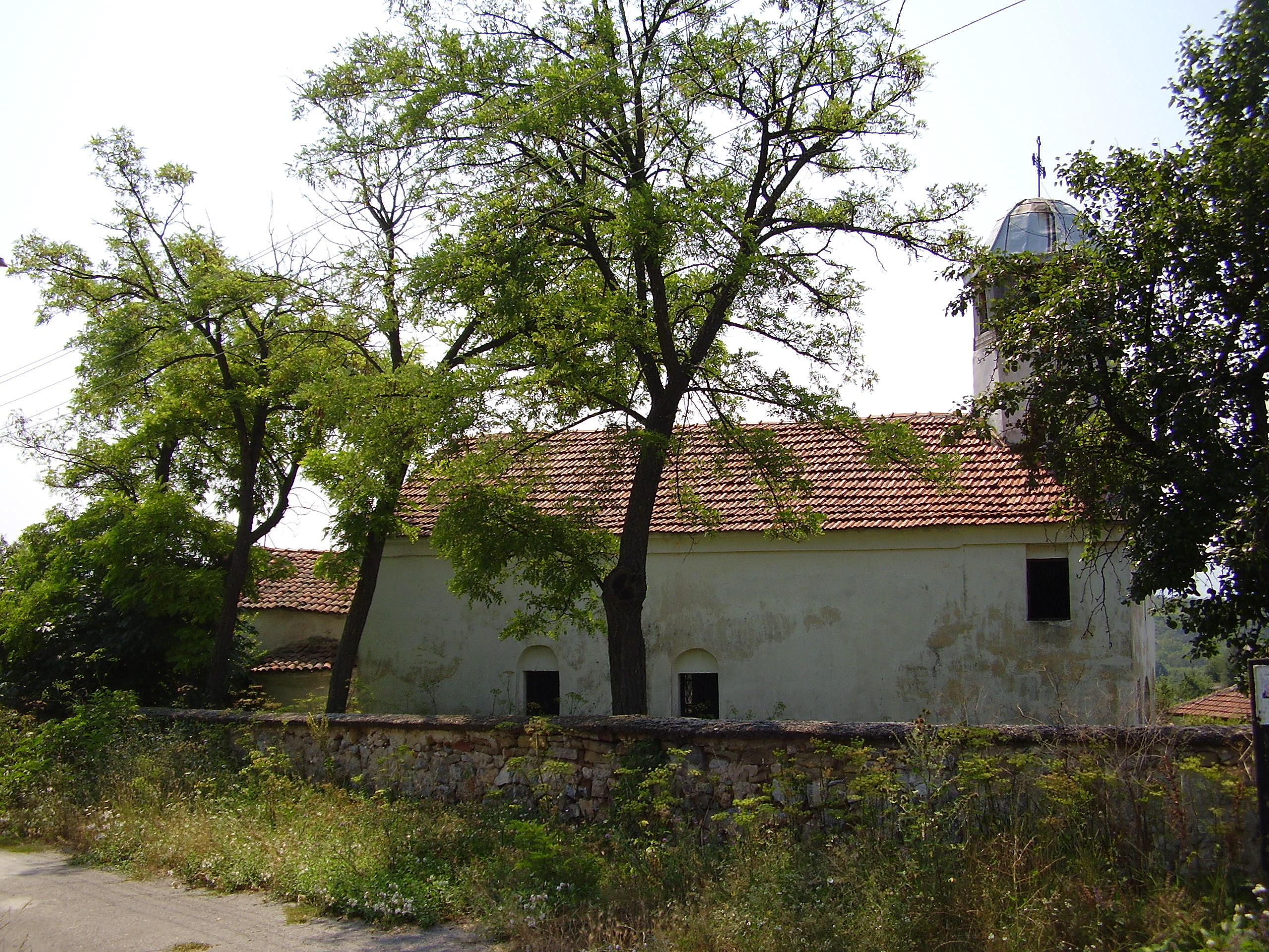 Църквата "Света Петка" в с.Таваличево, община Кюстендил